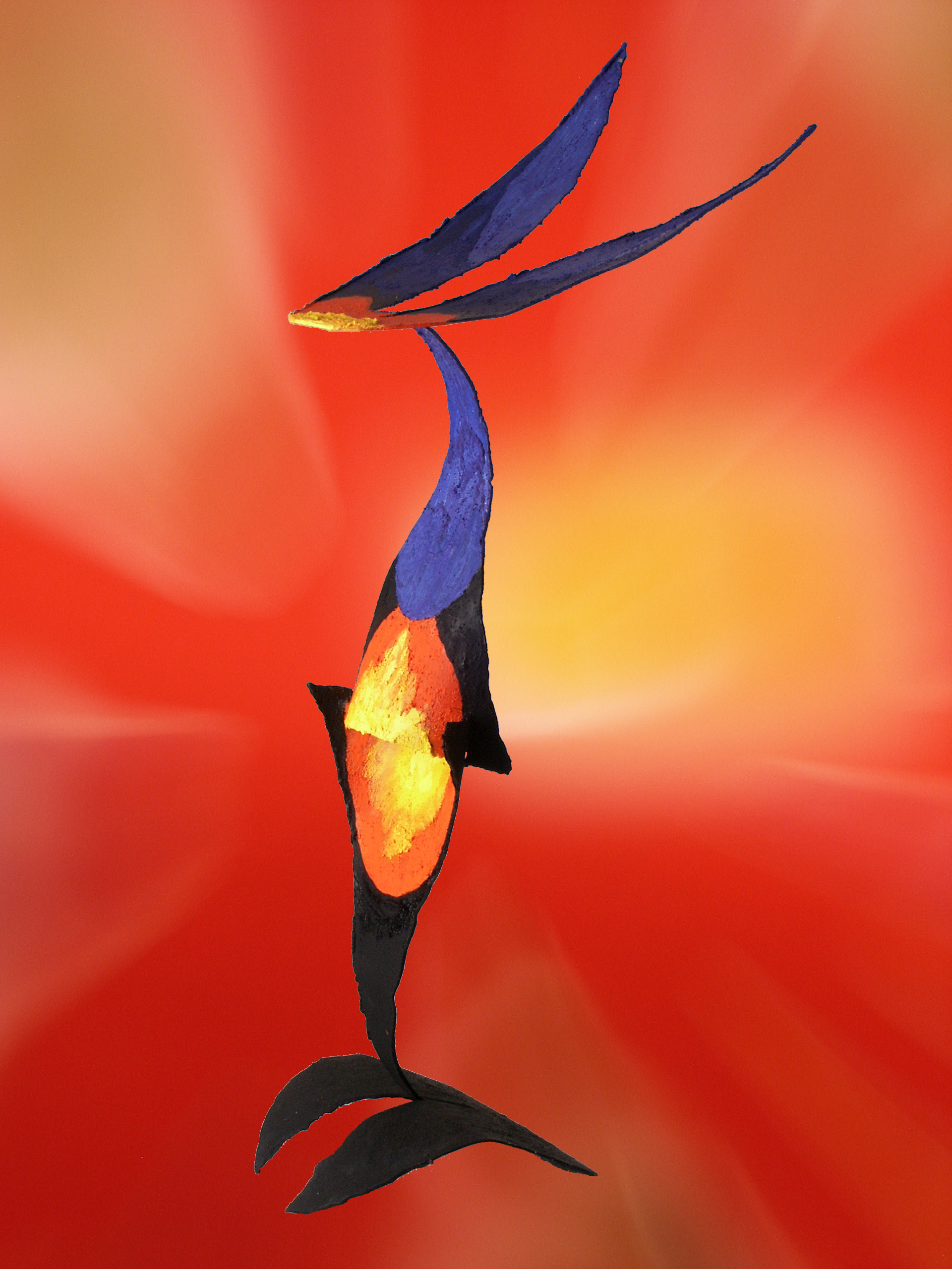 Escultura realizada en placa de acero y color. 2 x 0.90 x 0.60 metros